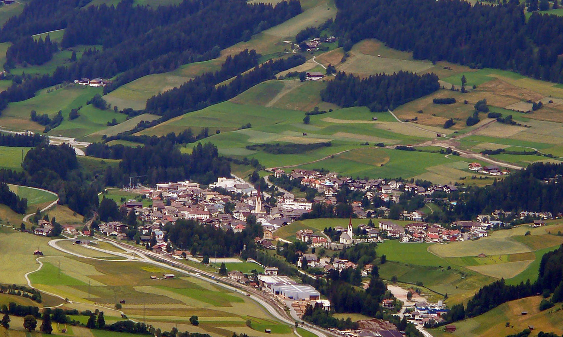 Panoramica di Monguelfo-Tesido dal monte Serla